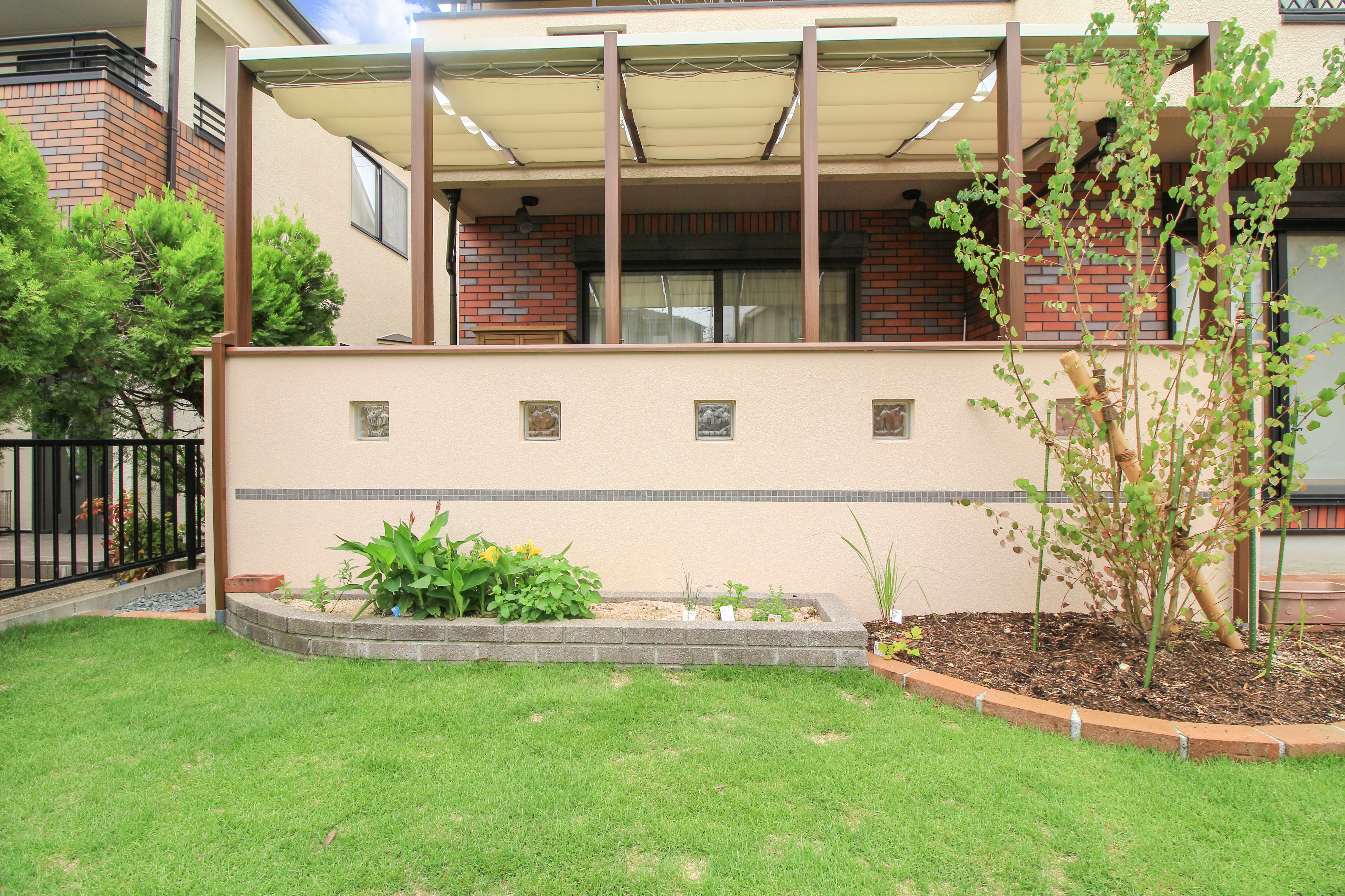 FIT工法 FIT WALL | 大林株式会社 施工：Hiwawari life.Kobe